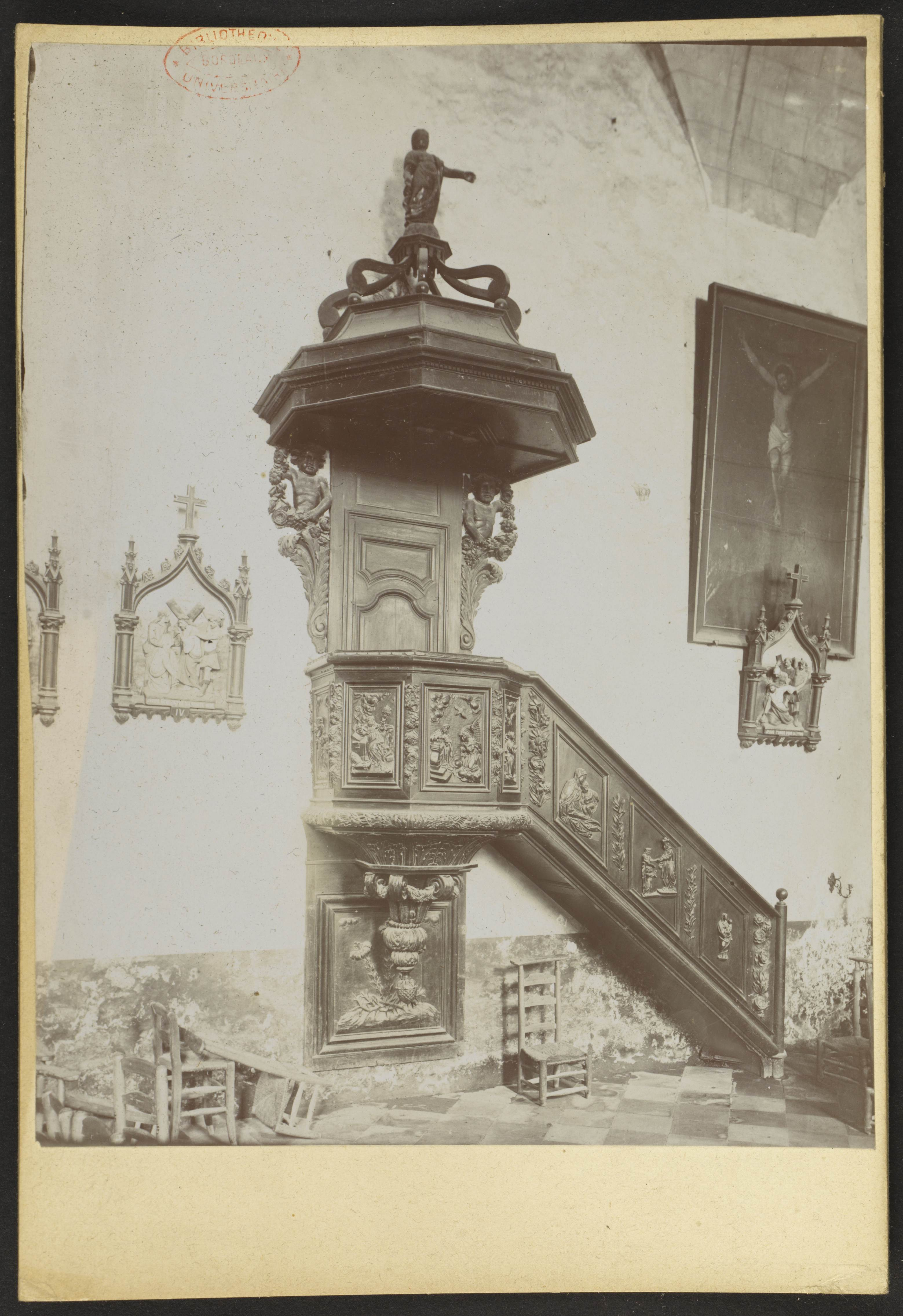 Eglise Saint-Martin de Fronsac; Chaire